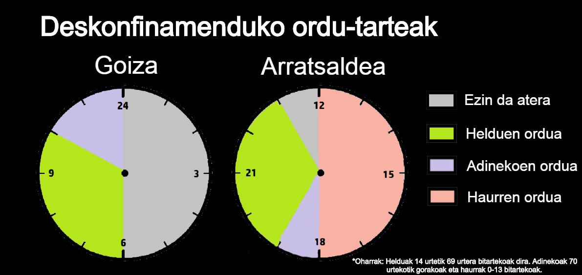 2020ko udaberrian (maiatzaren 2tik ekainera arte) derrigorrezko berrogeialditik irteteko deskonfinamendu prozesua hasi zen Euskal Herrian. Hego Euskal Herrian ezarritako ordu-tarteak erakusten ditu irudiak.